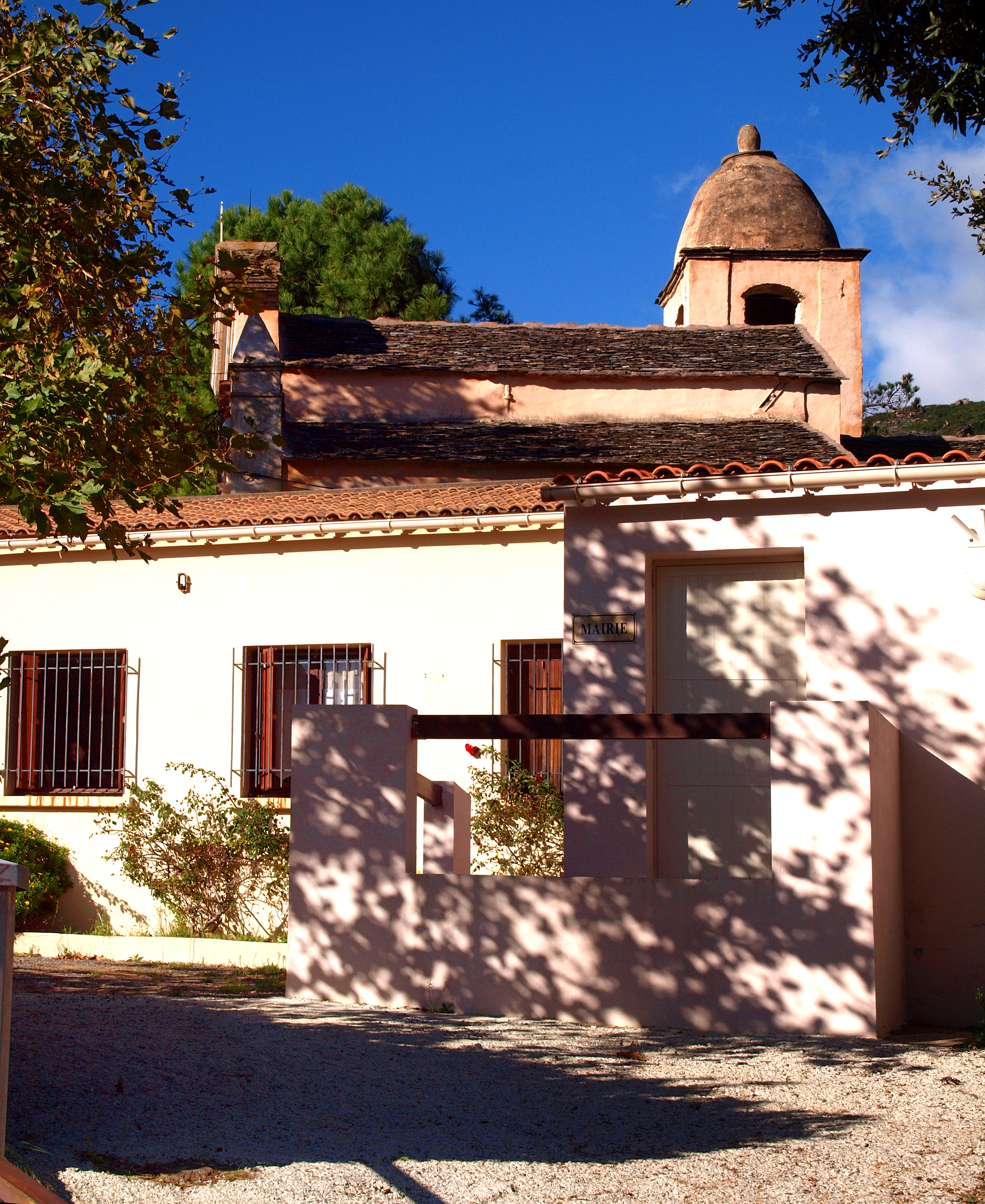 Barbaggio (Corse) - Mairie. A l'arrière, le clocher de l'église Saint-Marcel